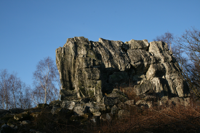 Teufelsfels, Quarzithärtling im Lützelsoon (Rheinland-Pfalz)